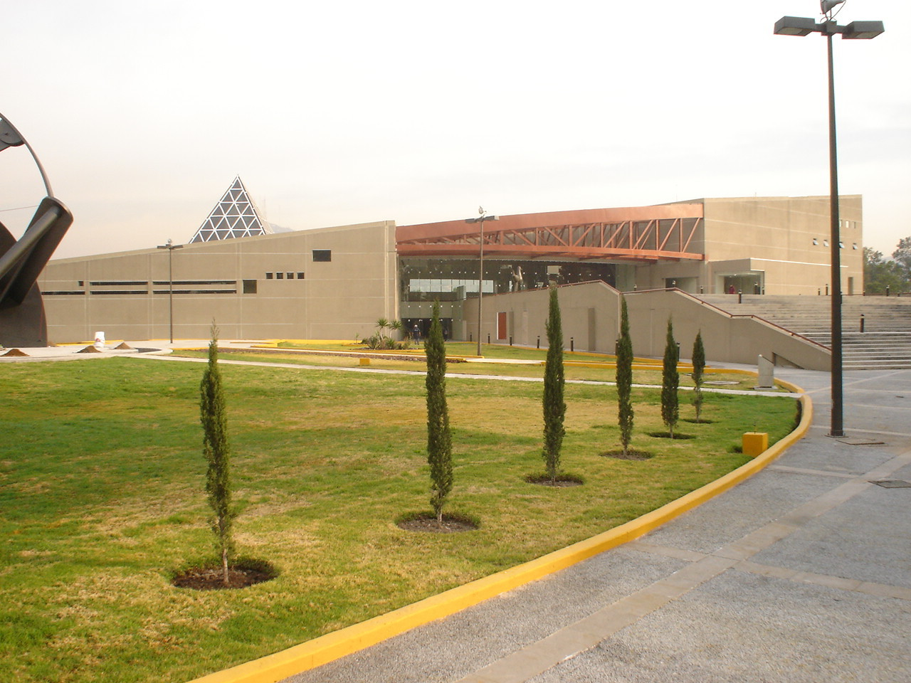 EDIFICIO DE LA UNIDAD POLITECNICA PARA EL DESARROLLO Y LA COMPETIVIDAD EMPRESARIAL